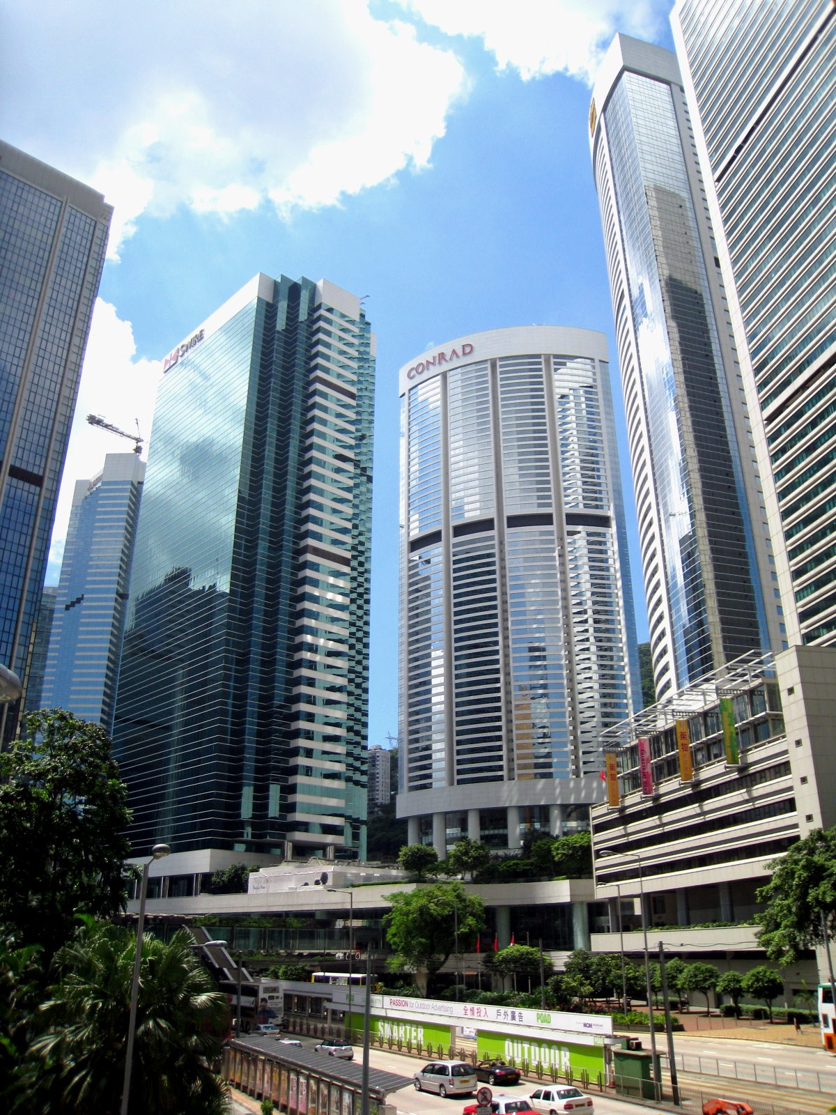 HK Pacific Place 太古廣場